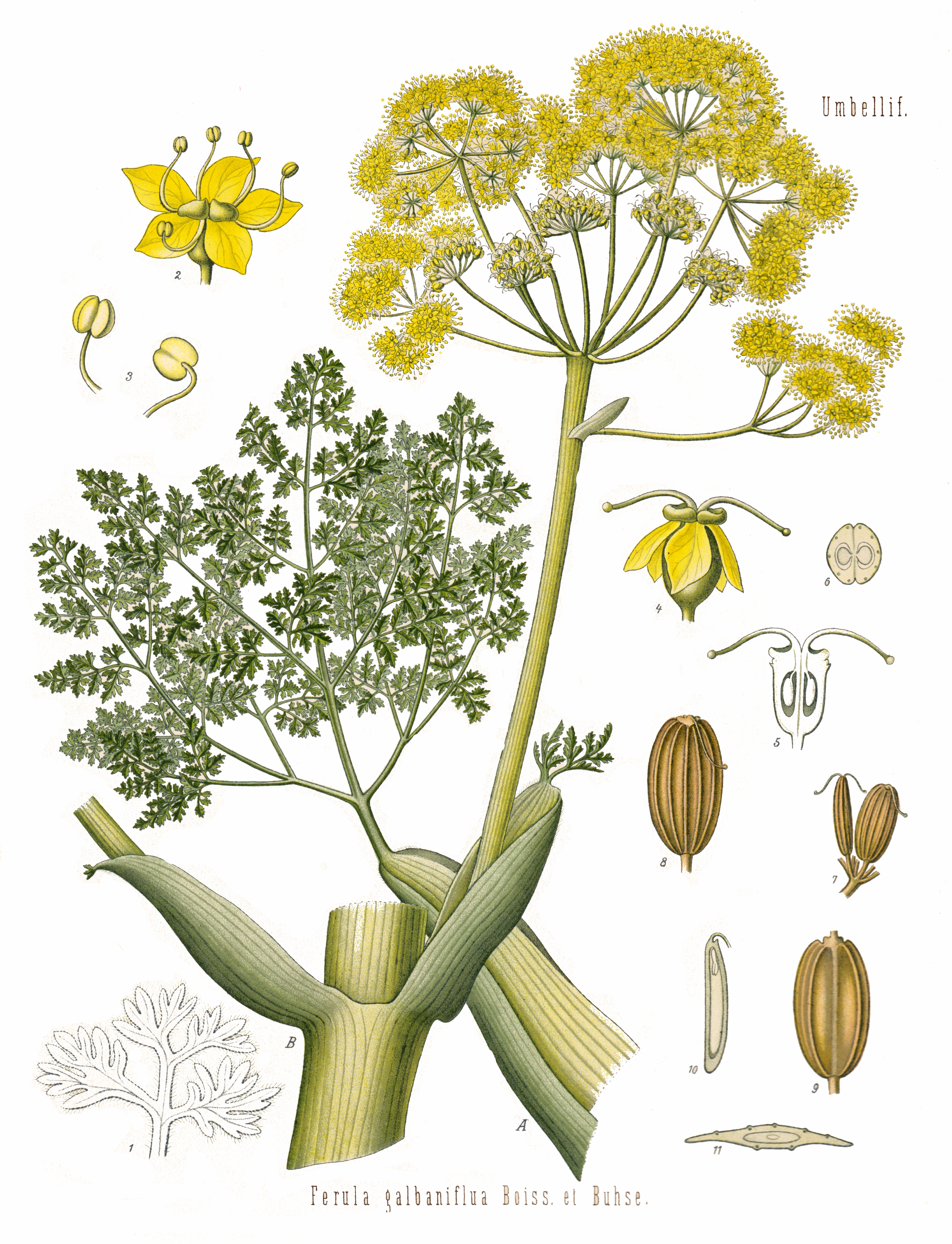 Abbildung von Ferula gummosa